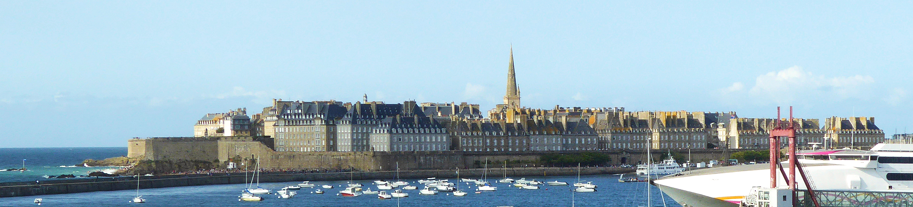 Saint-Malo Panorama (Remparts/Walled City/Altstadt mit Stadtmauern) und links Bastion St Philippe und mittig Kathedrale St Vincent - Foto 2017 Wolfgang Pehlemann P1170149